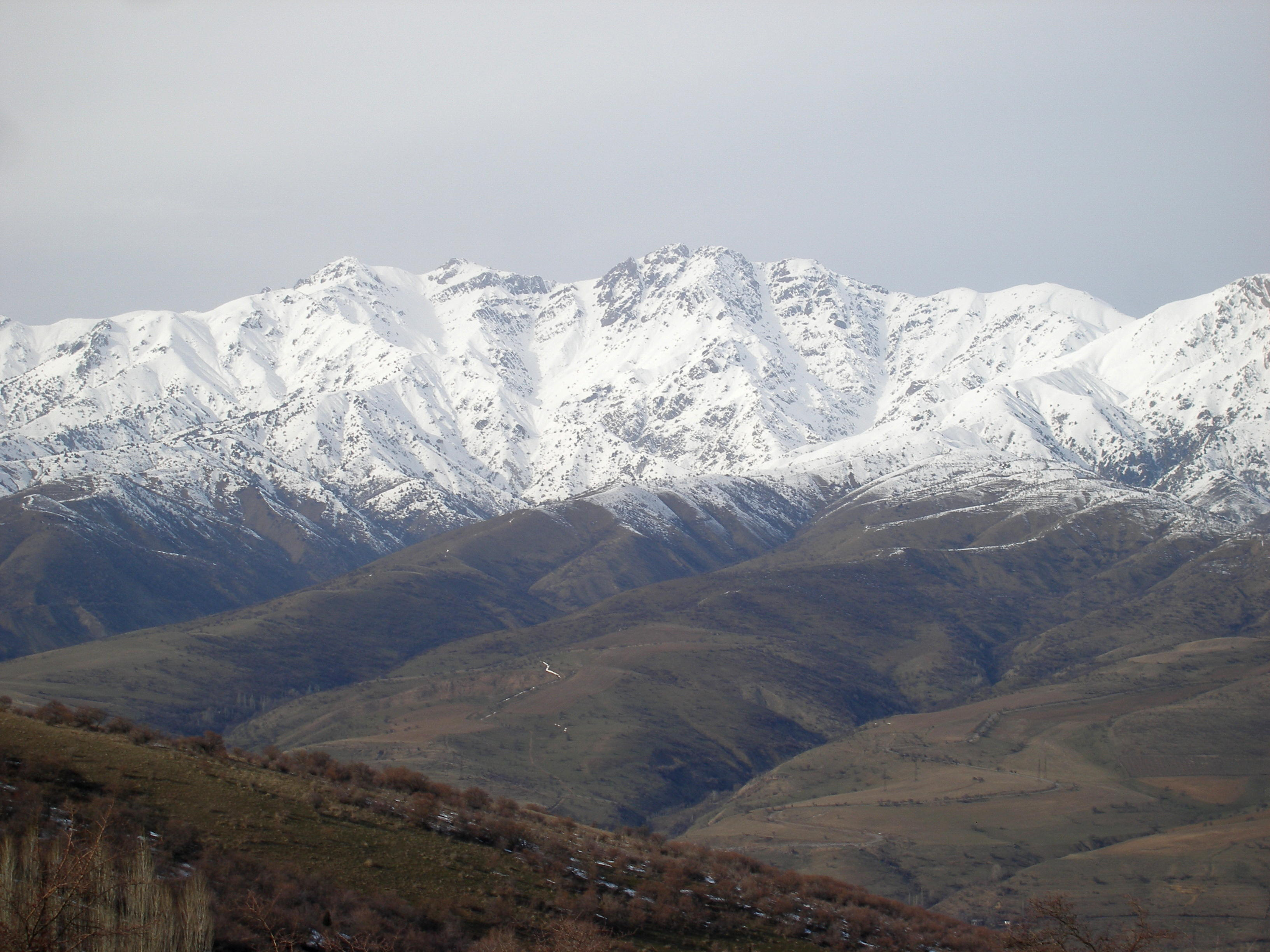 Вид на хребет Коржантау. В центре снимка - вершина Мингбулак. Бостанлыкский район, Ташкентская область, Республика Узбекистан.